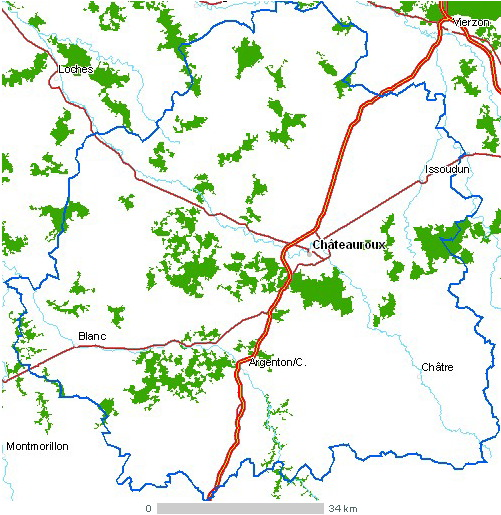 Carte du département Indre Légende